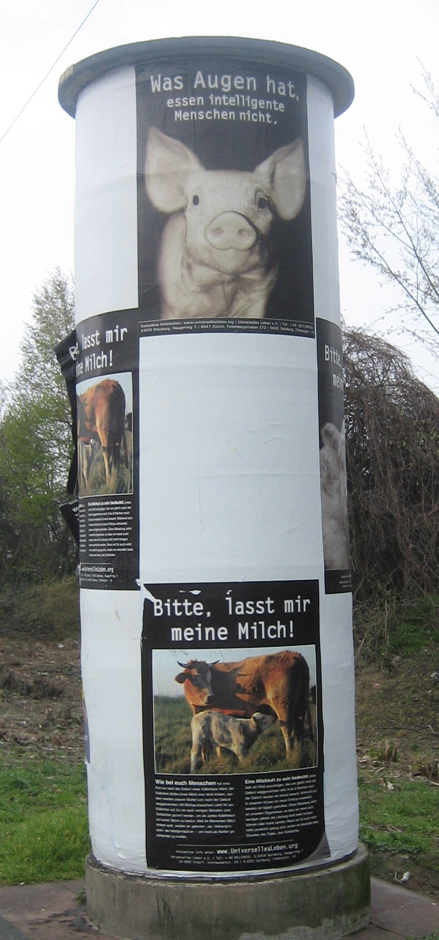 Plakate der deutschen religiösen Bewegung "Universelles Leben", gesehn in Neuwied Advertisement for the german religious movement "Universelles Leben", seen in Neuwied